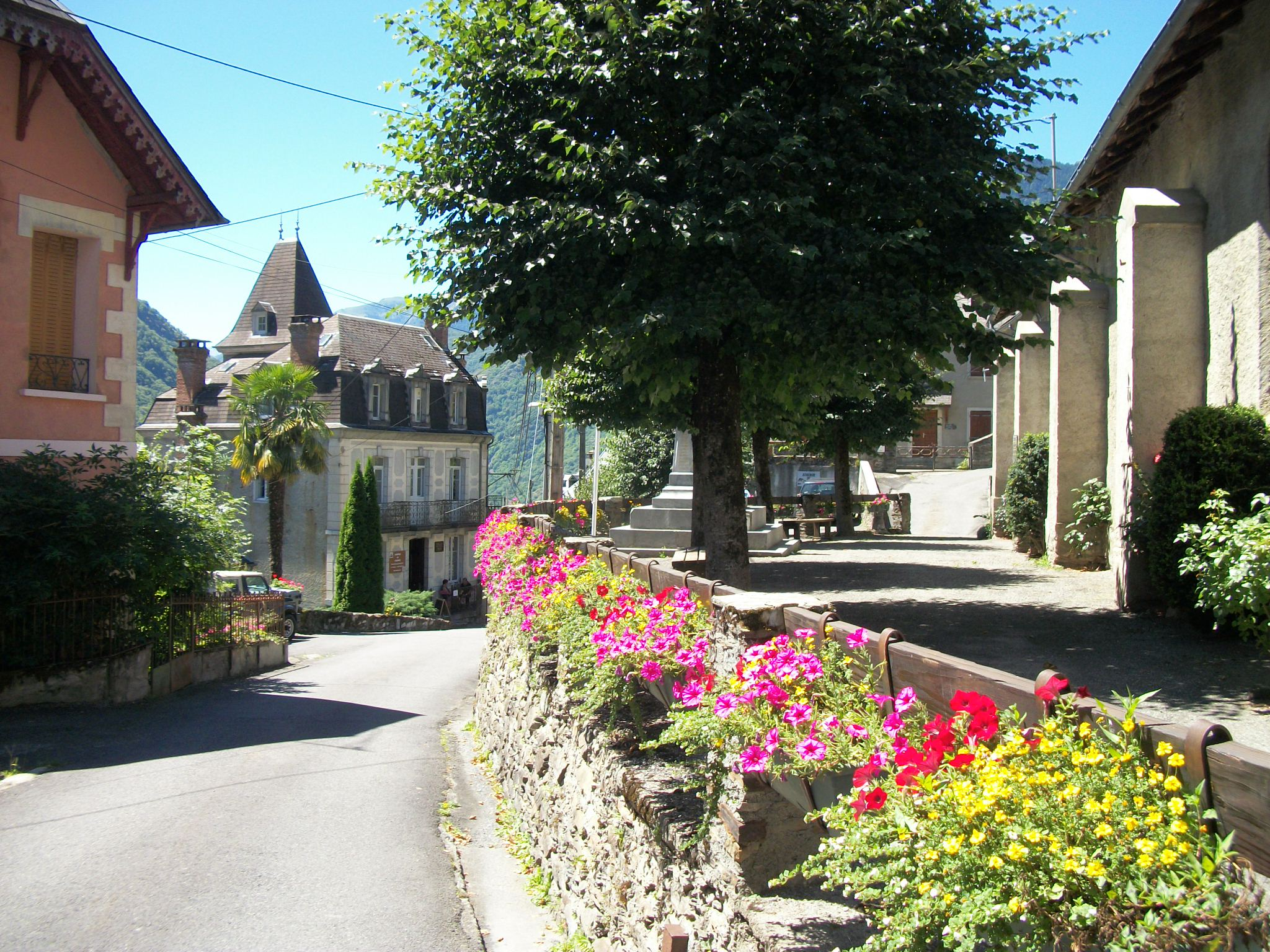 Centre du village